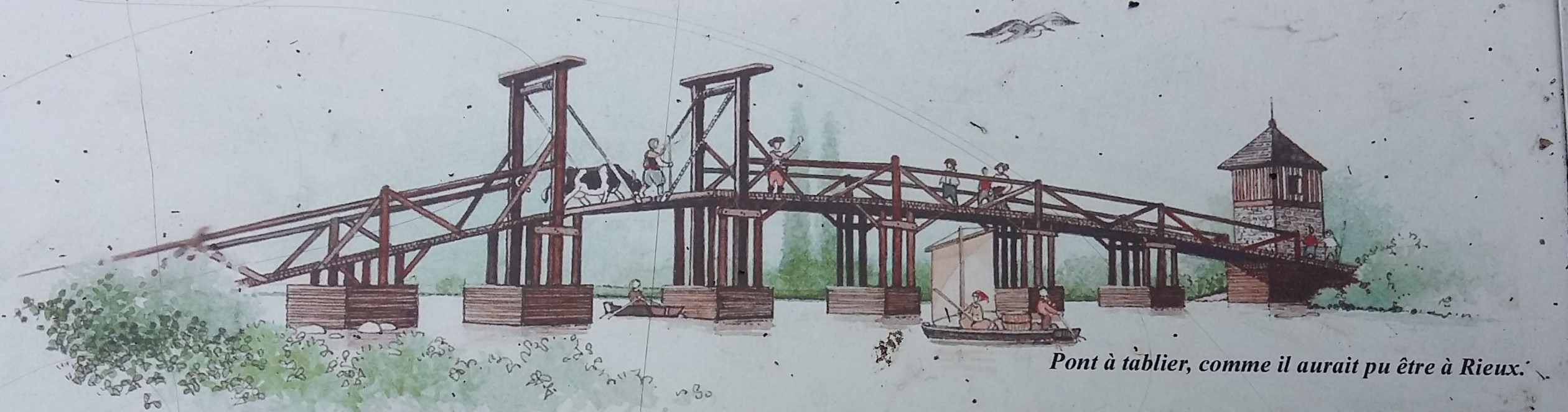 Pont du Moyen Age franchissant le Vilaine au niveau de Rieux et Fegreac